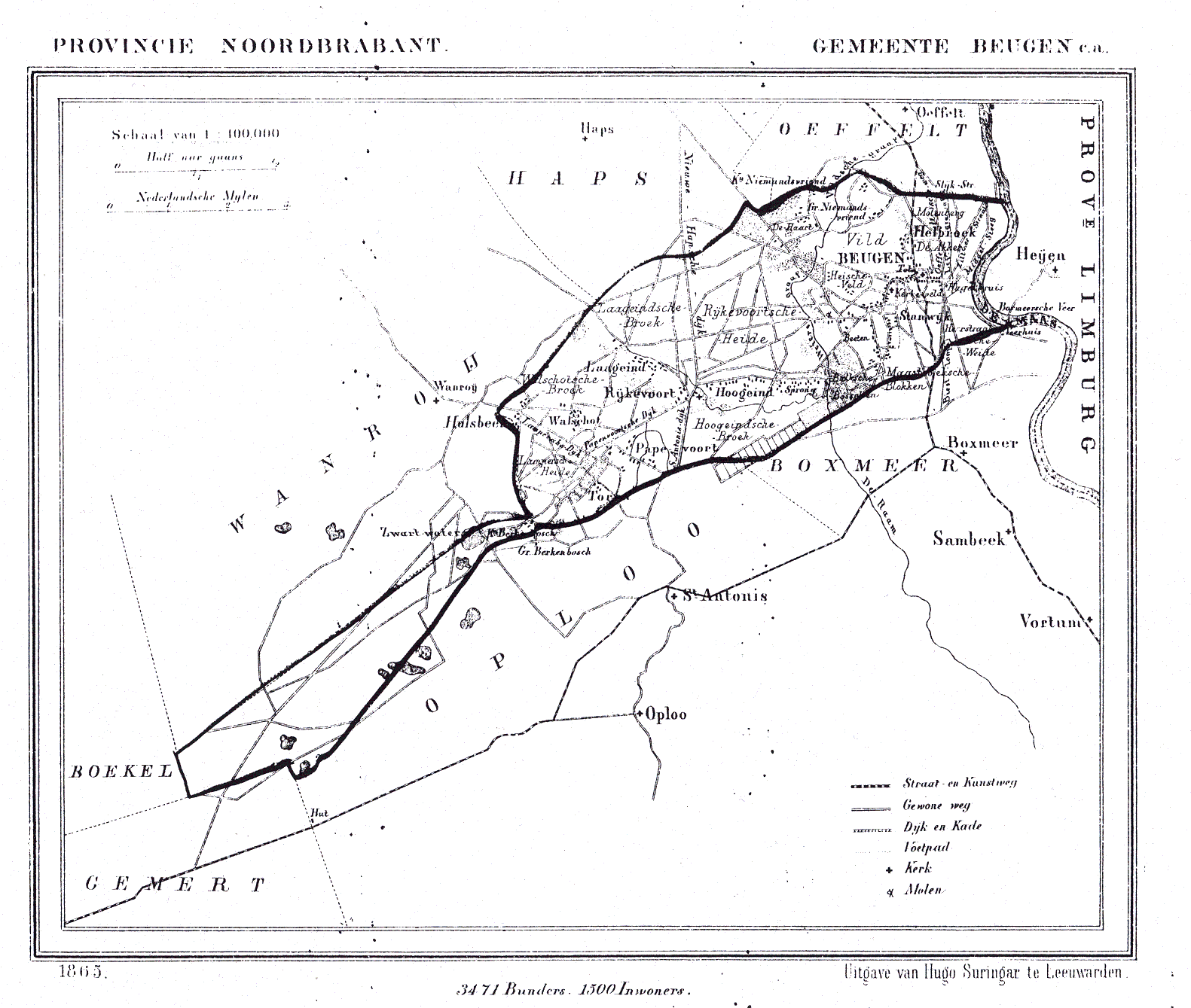 Nederland, Noord-Brabant, Gemeente Beugen